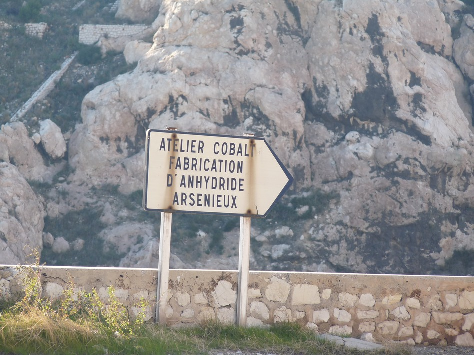 Mémoire des Riaux par S.E 2009